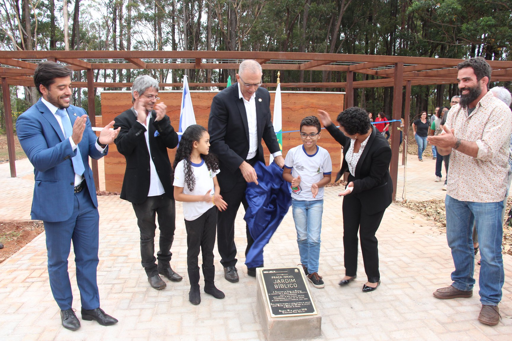 Inauguração Jardim Biblico